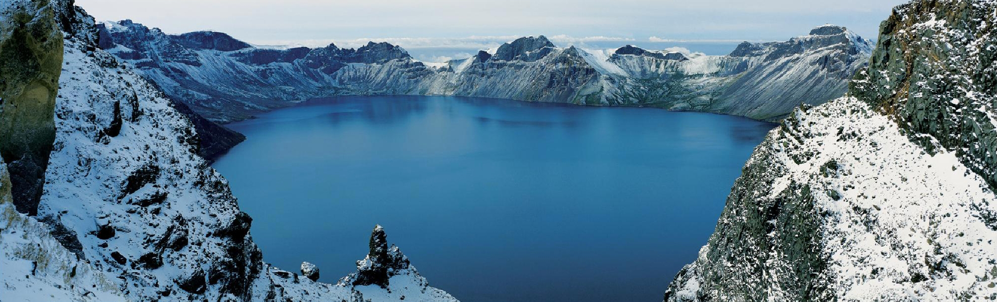 被白雪覆盖的长白山天池